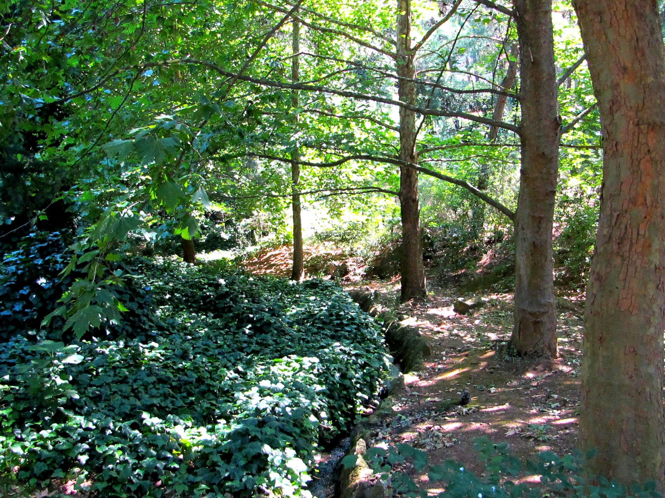 THESSALONIKI-ZOO PARK